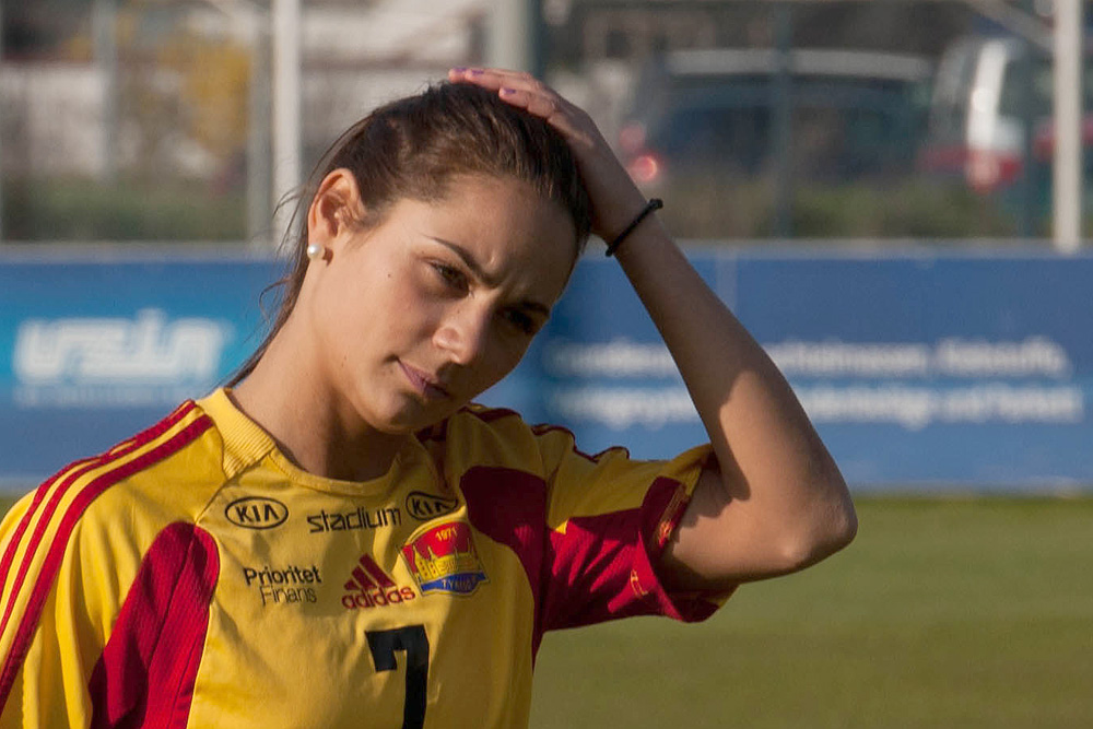 UEFA Women's Champions League 2013/14 SV Neulengbach - Tyresö FF Neulengbach, 29. März 2014 Lisa Klinga